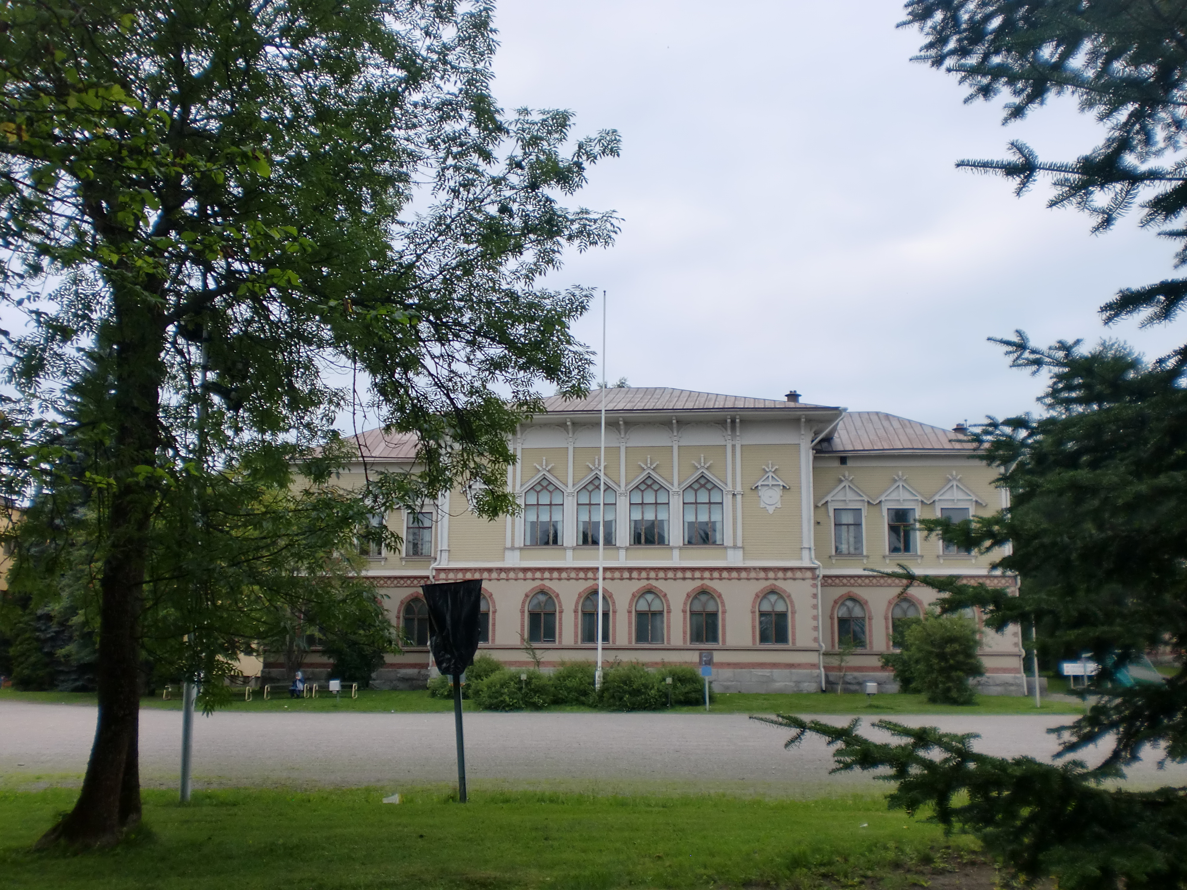 Heinolan seminaari; rakennettu kulttuuriympäristö Heinolassa